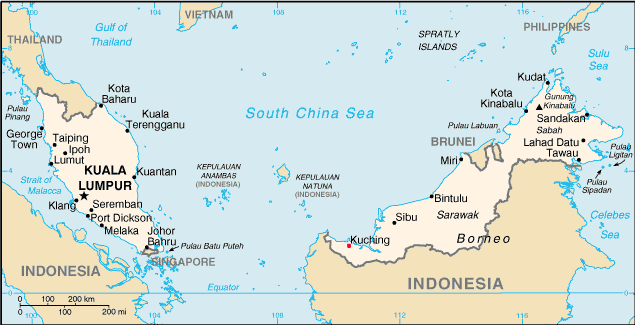 CIA World Factbook